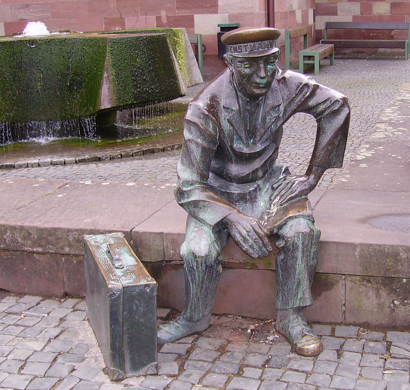 view of Zweibrücken, Germany